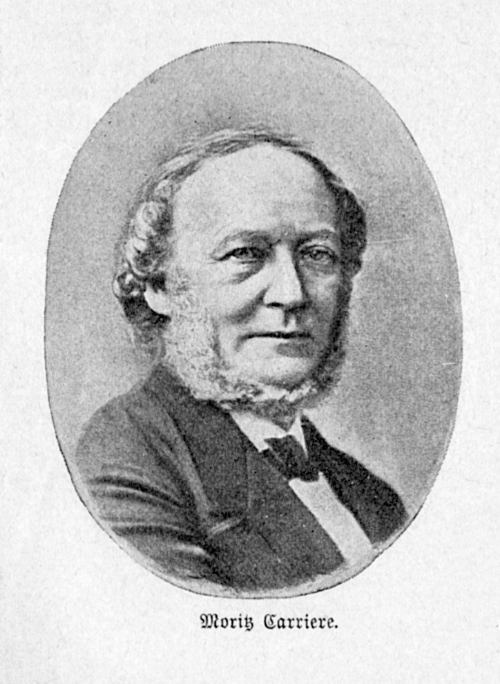 Bildnis von Moriz Carrière